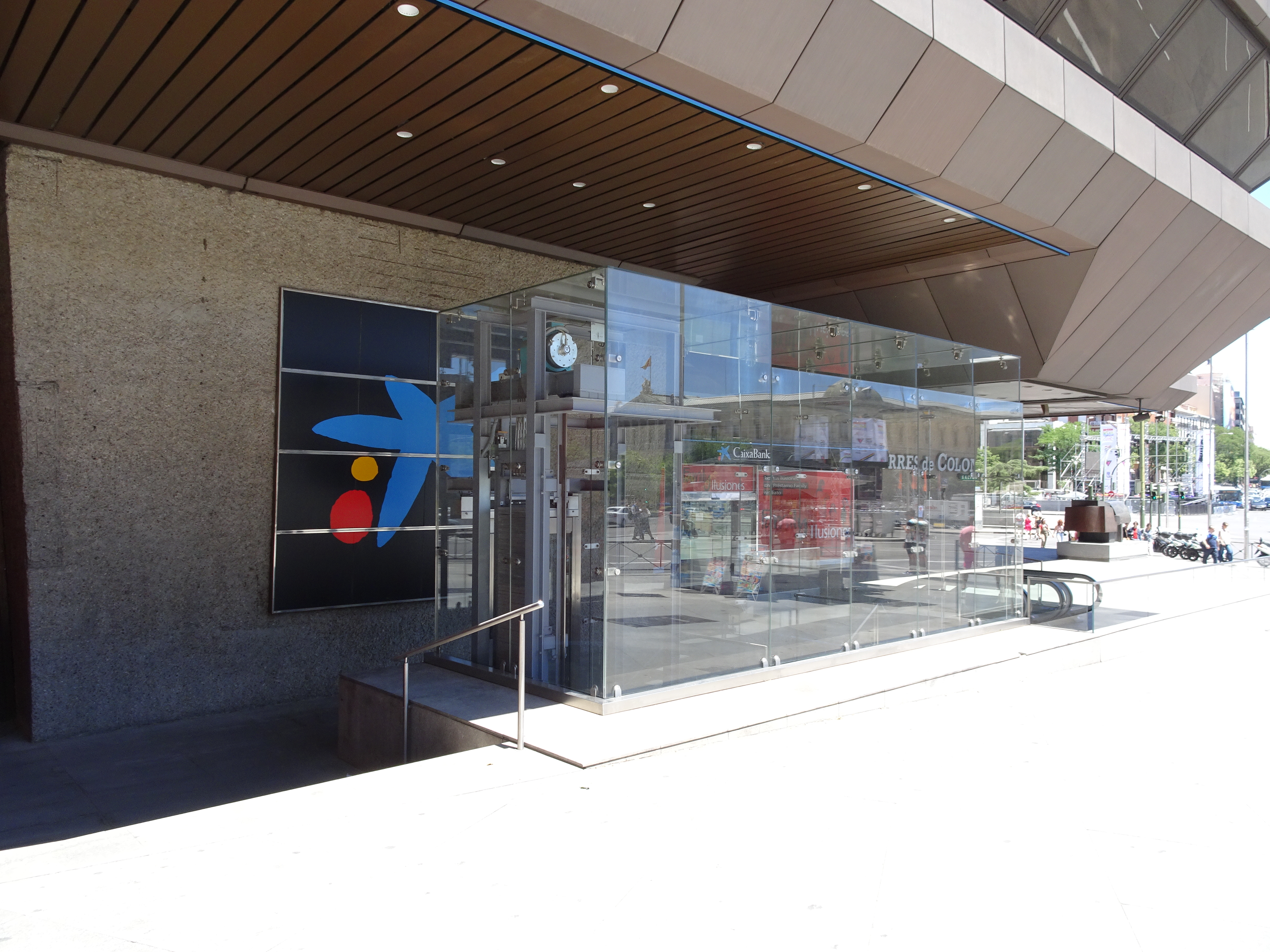 Ascensor panorámico recubierto de cristal.